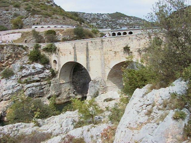 Pont du Diable over the Hérault River, France